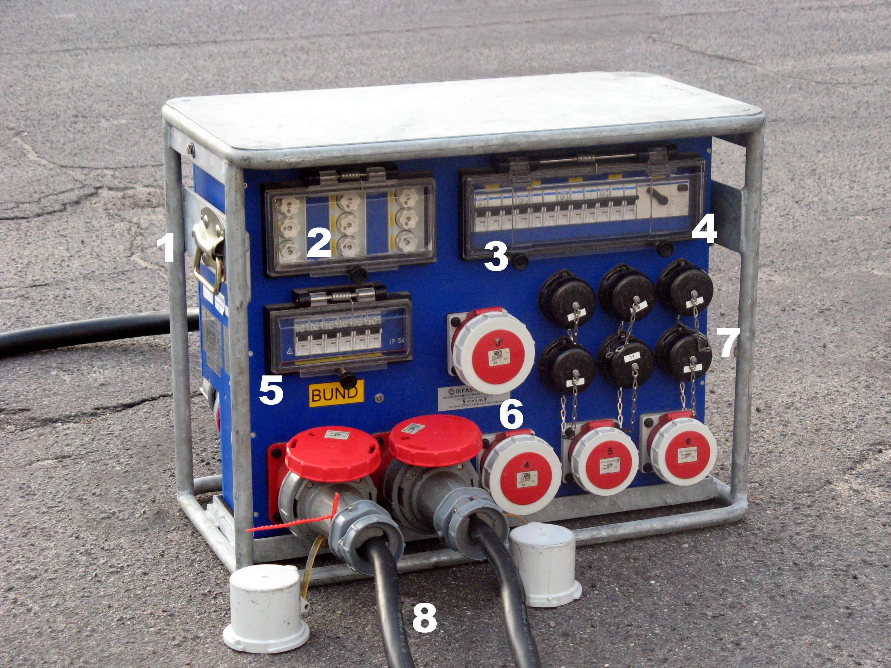 Baustromverteiler mit Markierungen. 1: Tragegriff 2: Neozed-Schmelzsicherungen 3: vier 3-polige Leitungsschutzschalter 4: Fehlerstromschutzschalter 5: sechs 1-polige Leitungsschutzschalter 6: CEE-Anschlußdosen (mit Deckeln verschlossen) 7: 230V-Steckdosen (mit Deckeln verschlossen) 8: wegführendes Kabel (H07RN-F 5G10, Querschnitt: 5 x 10 mm², Gummischlauchleitung